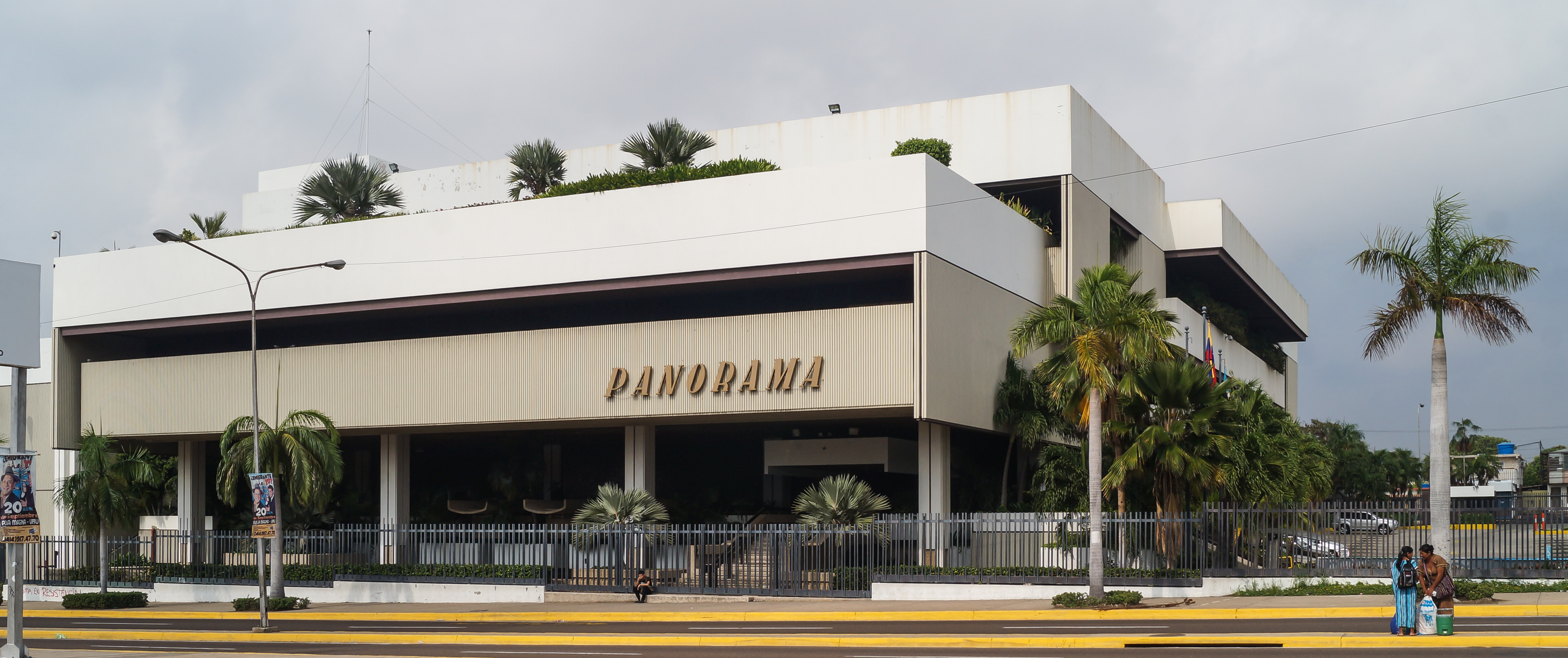 Sede del diario Panorama inaugurado el 1 de diciembre de 1914 y reinaugurado en 1984. Está hecho de concreto armado y ocupa un espacio de 16.000 m² y 32.000 m² de construcción. Su forma es rectangular de cuatro plantas con tres niveles y un sótano, todos relacionadas entre sí. Muestra fachadas sencillas y dinámicas que combinan diversos diseños, como ambientes cerrados con terrazas y jardines con o sin techo. El acceso principal está definido hacia la avenida 15 (Las Delicias), ubicado en el casco histórico de la ciudad de Maracaibo, hacia el oeste, cercano al cementerio y al elevado de la calle 93 (Padilla). Maracaibo.